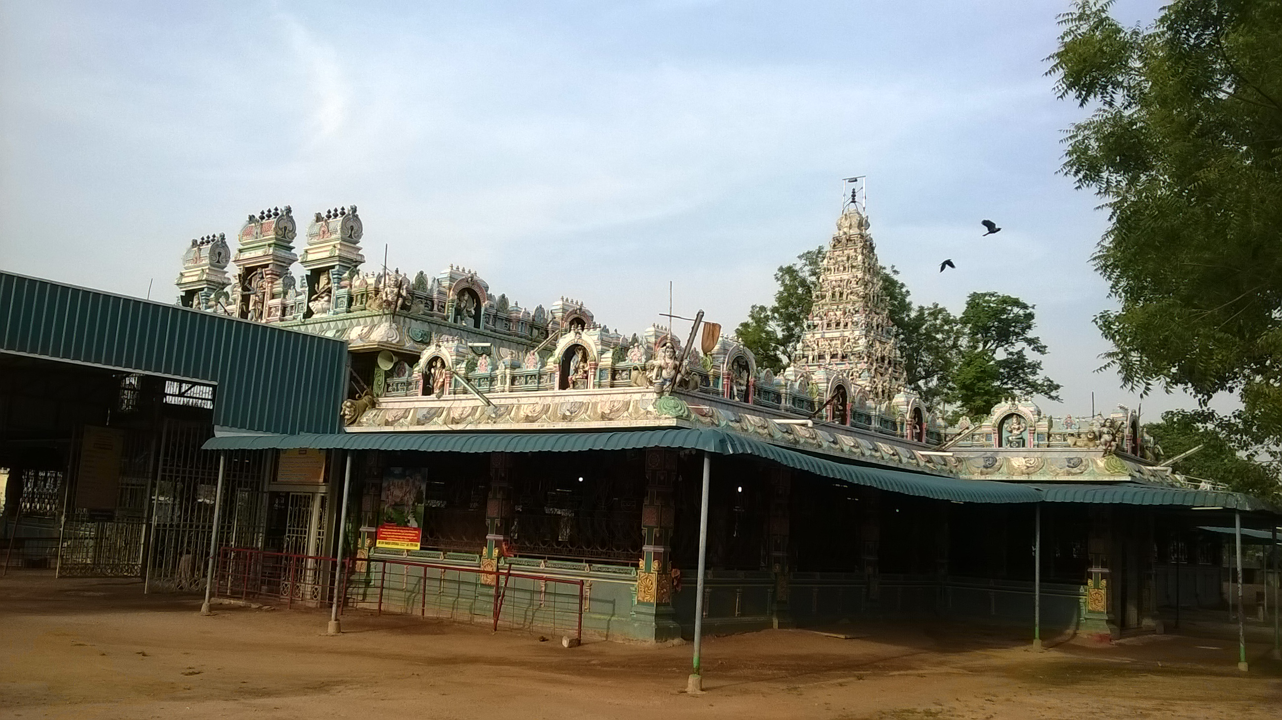 మైసిగండి మైసమ్మ దేవాలయం(ఎడమ వైపు)